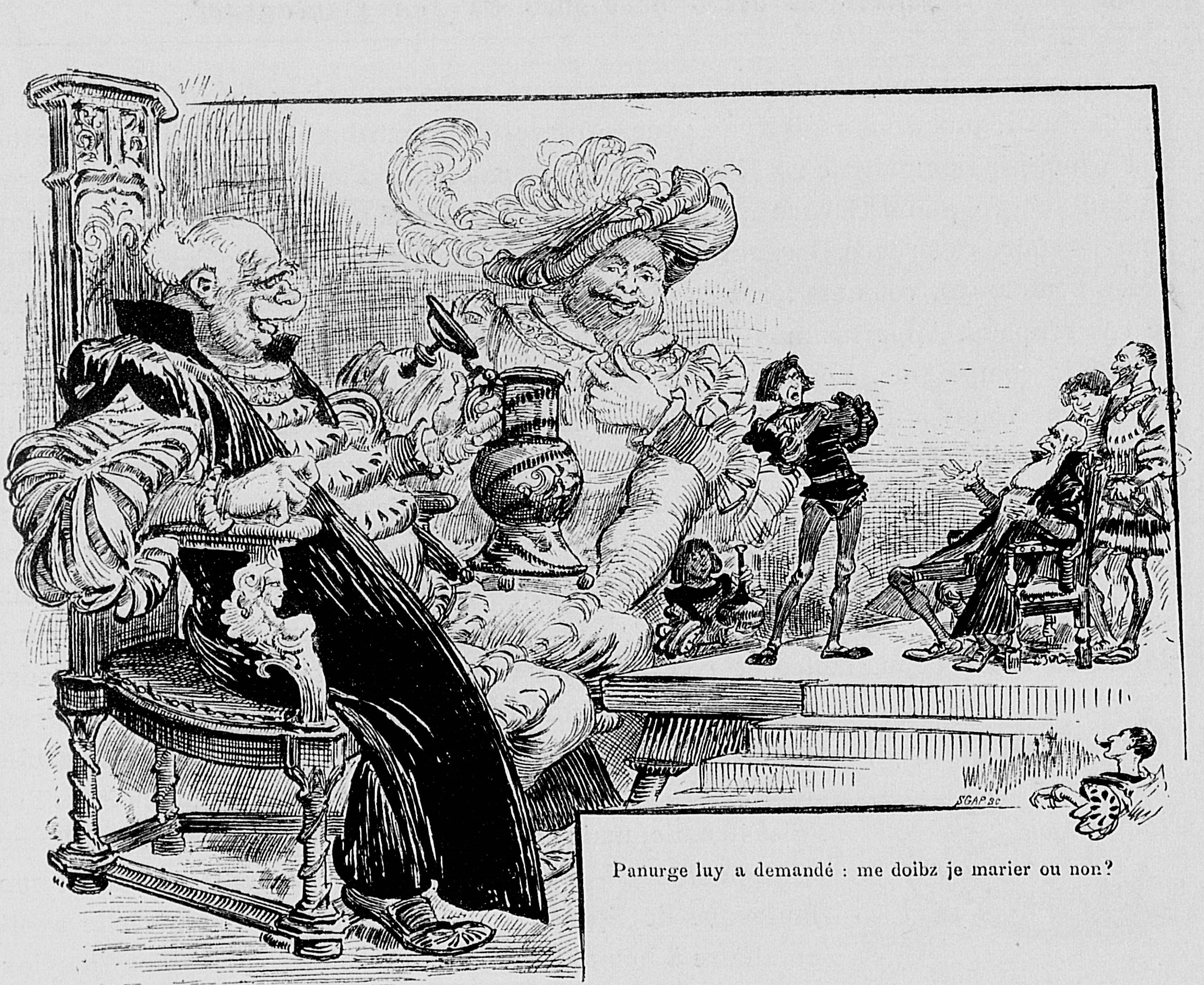 Illustration du Tiers Livre de François Rabelais, illustré pour une édition des Œuvres complètes en deux volumes par la Librairie illustrée en 1886.